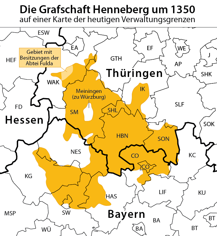 Lagekarte der Grafschaft Henneberg um 1350. Hinterlegt die heutigen Kreis- und Ländergrenzen.